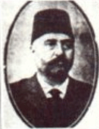 TBMM 1. dönem milletvekili.Tarih:1920